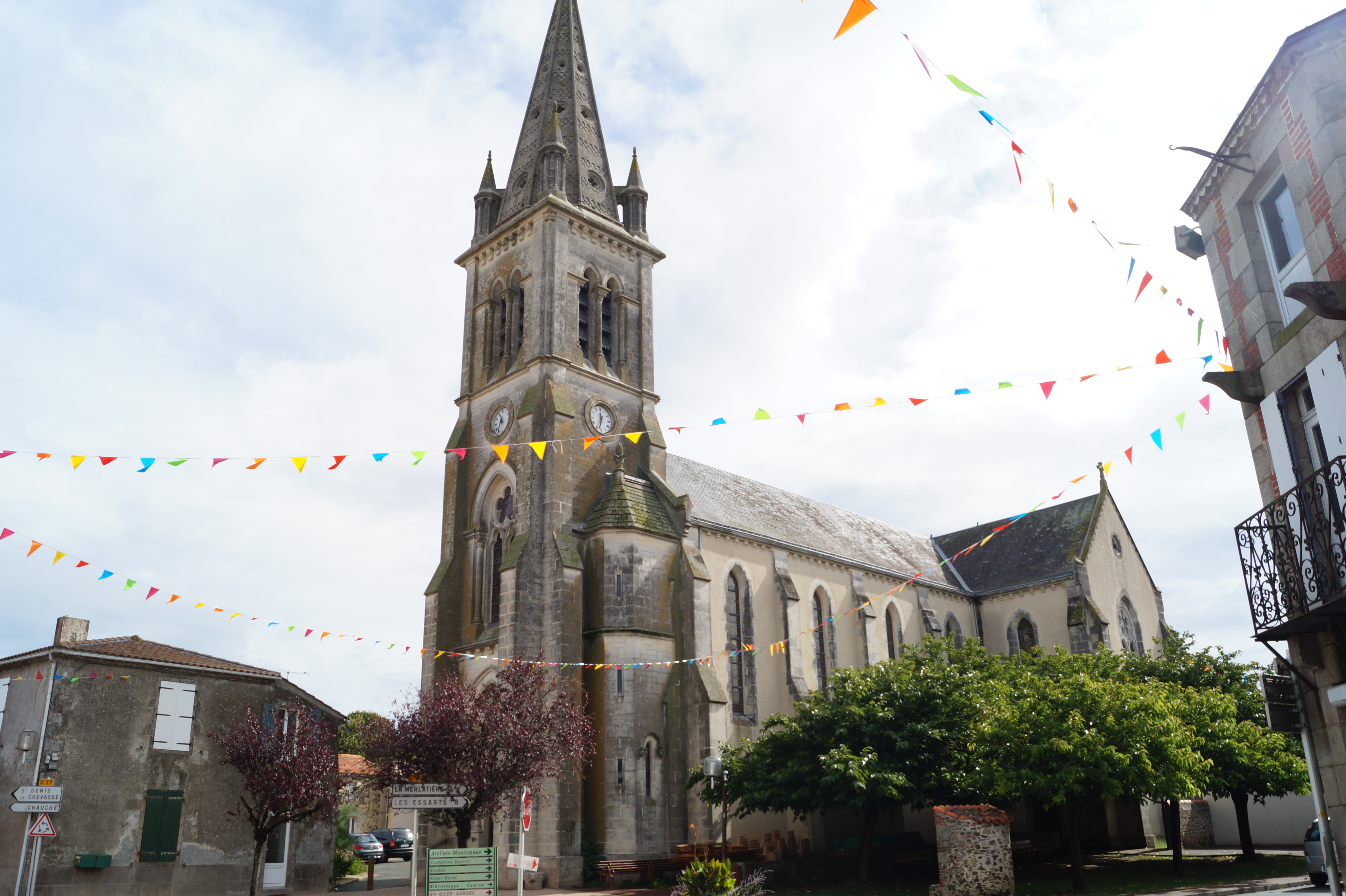 L’église Notre-Dame de Boulogne.